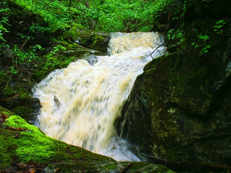 Гърнати